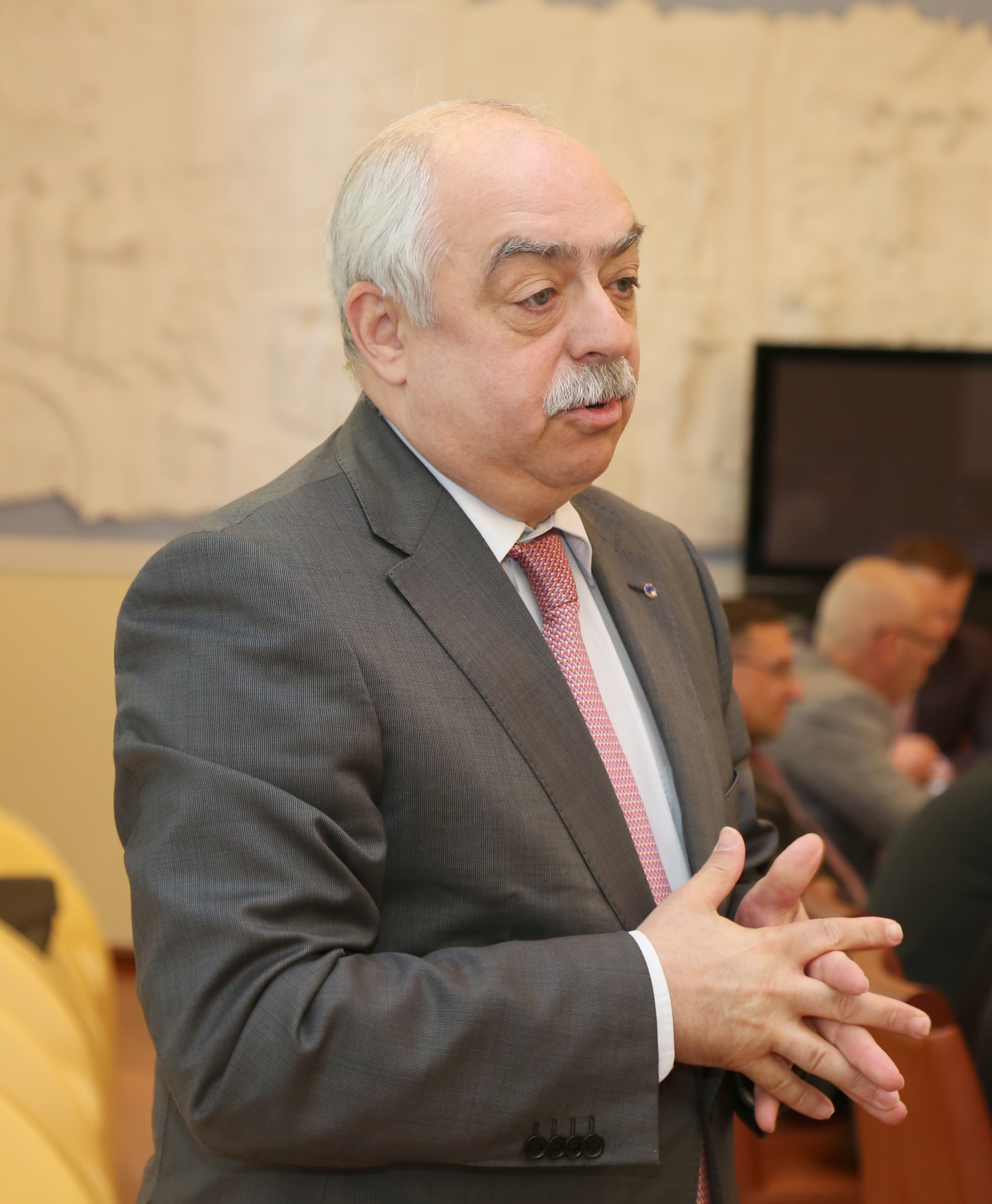 Стороженко, Сергей Михайлович